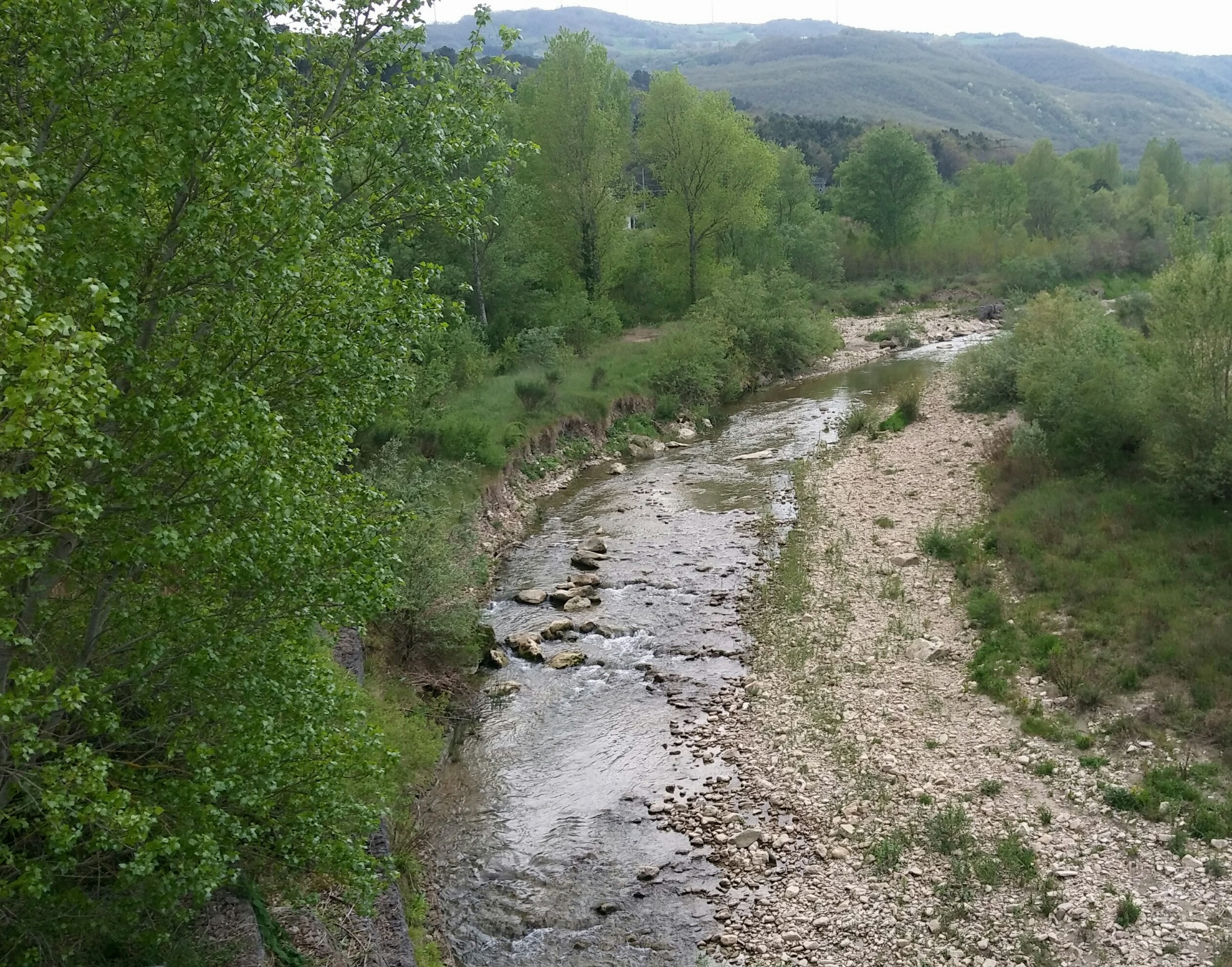 Fiume Cervaro a Montaguto